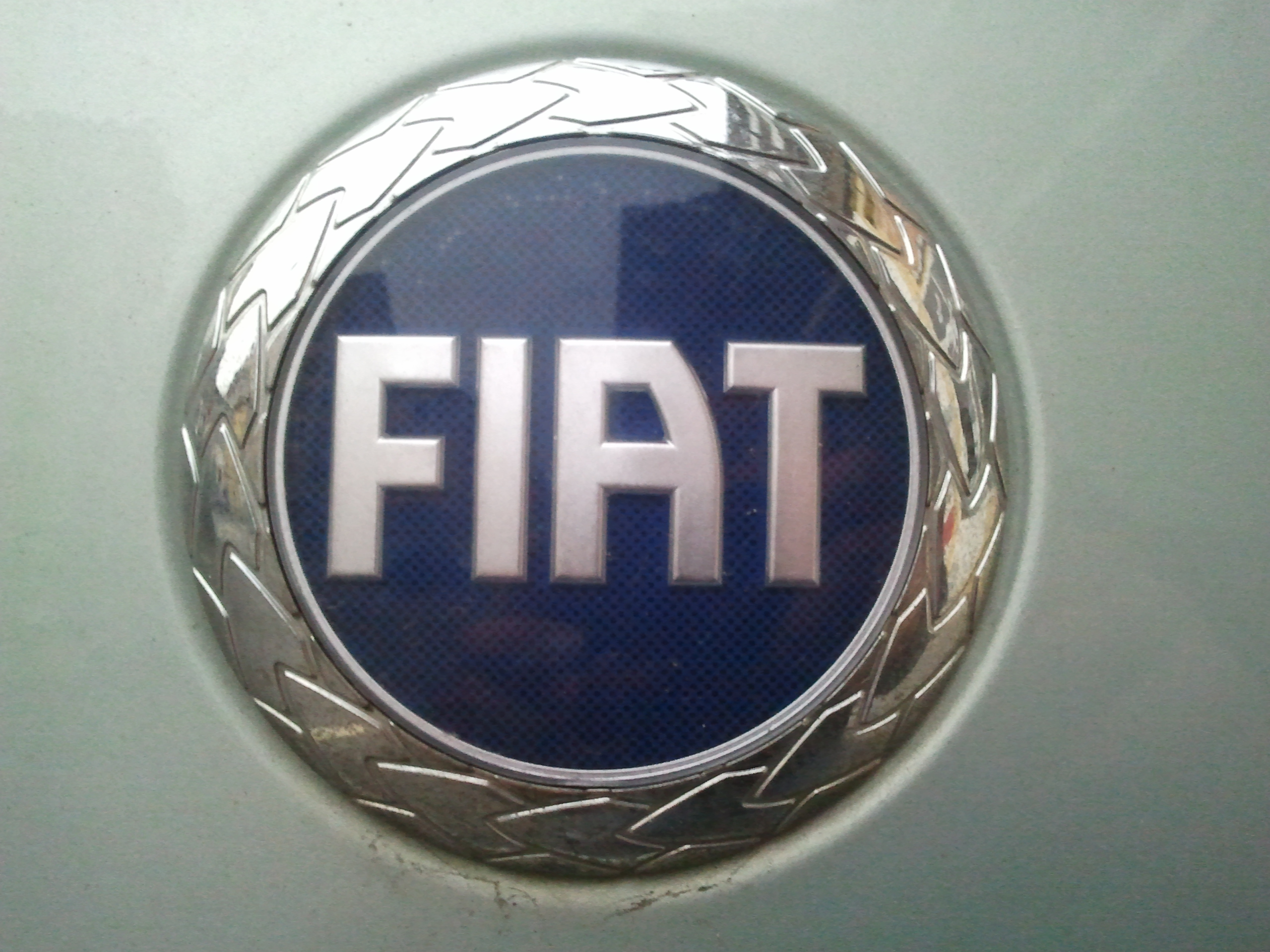 Logotipo Fiat 1999